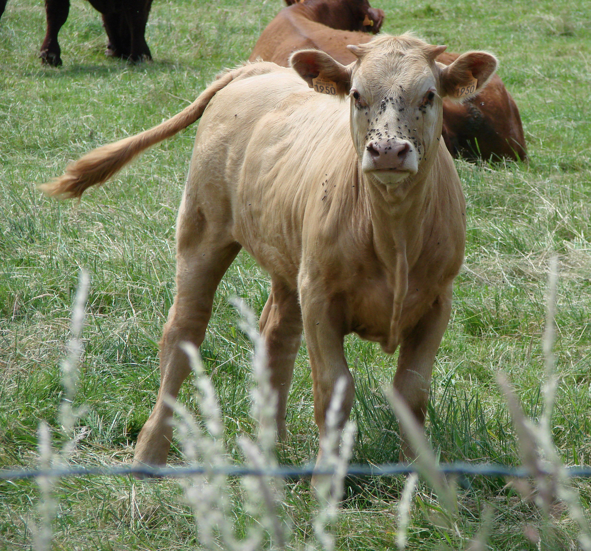 Calf